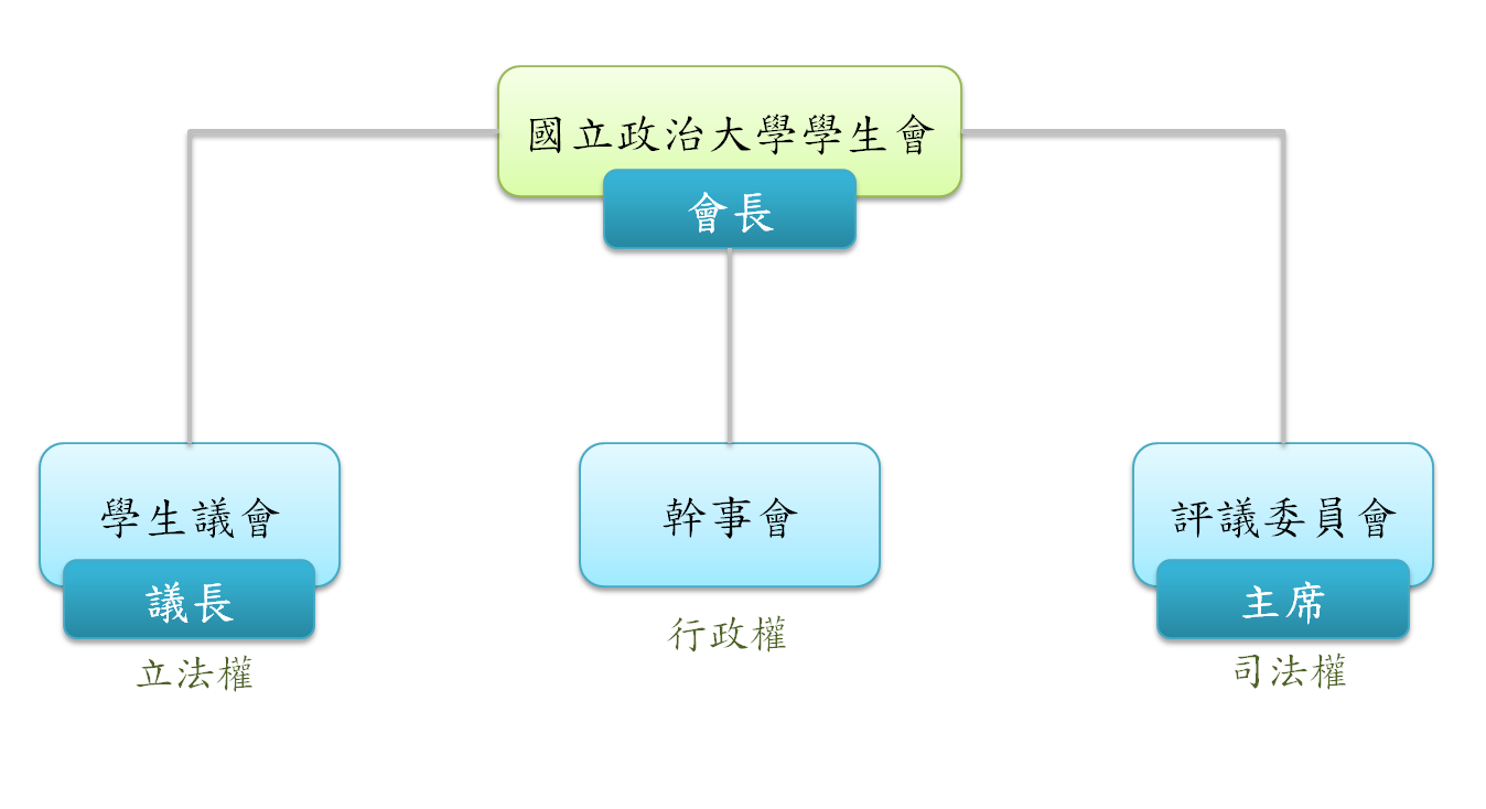 中文（台灣）: 國立政治大學學生會架構圖。